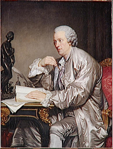 Le financier et amateur Watelet (1718 - 1786) mesure au compas une réduction en bronze de la Vénus Médicis, peut-être pour préparer la gravure qui illustre son Art de peindre, paru en 1760.